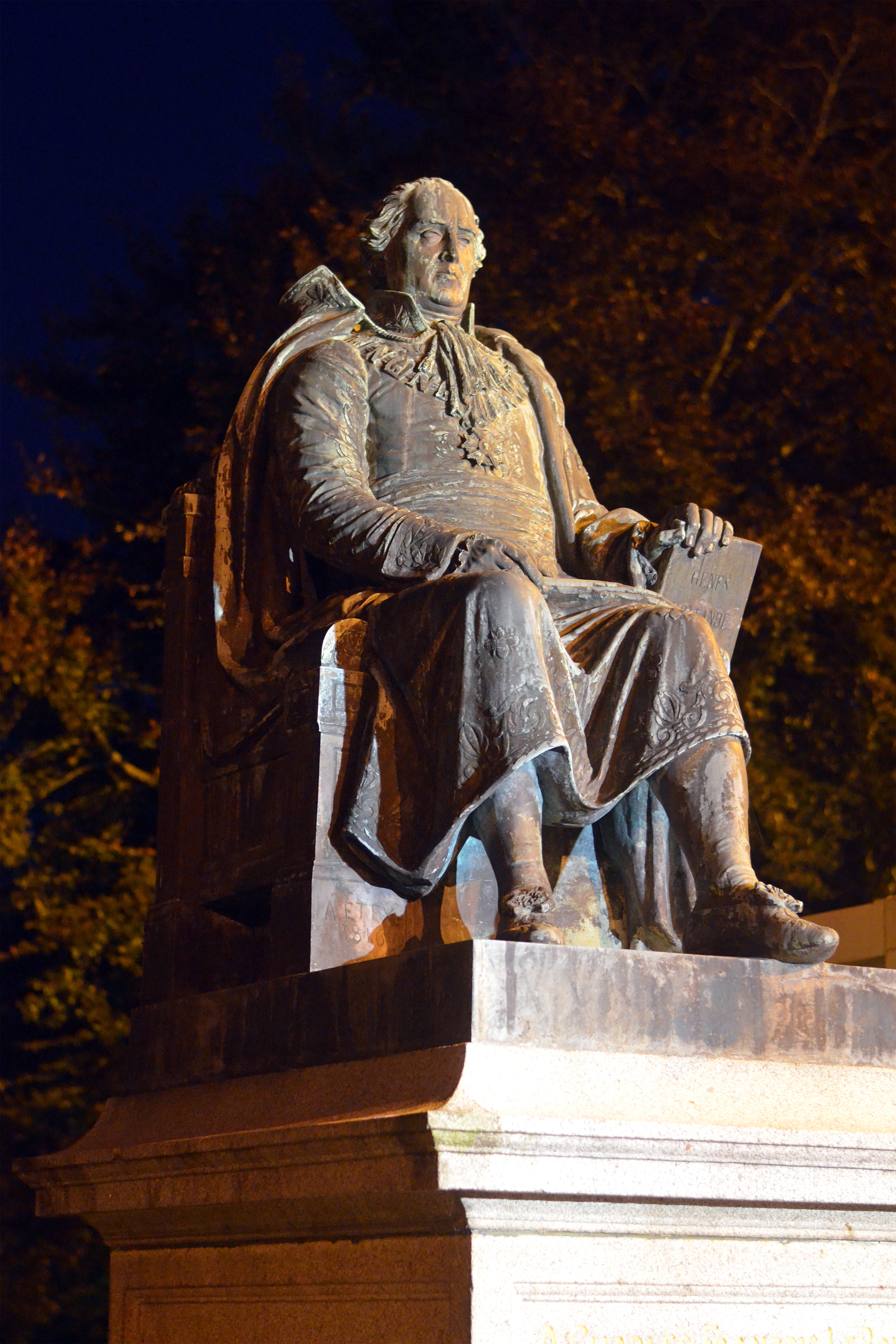 Statue de Charles-François Lebrun à Coutances sculptée en 1846 par Antoine Etex.